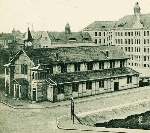 Interimskirche in Leipzig-Schleußig, erbaut 1905, Vorgängerbau der Bethanienkirche. Im Hintergrund die 1908 gerade erst eröffnete „Neue Schule“ in der Rödelstraße.